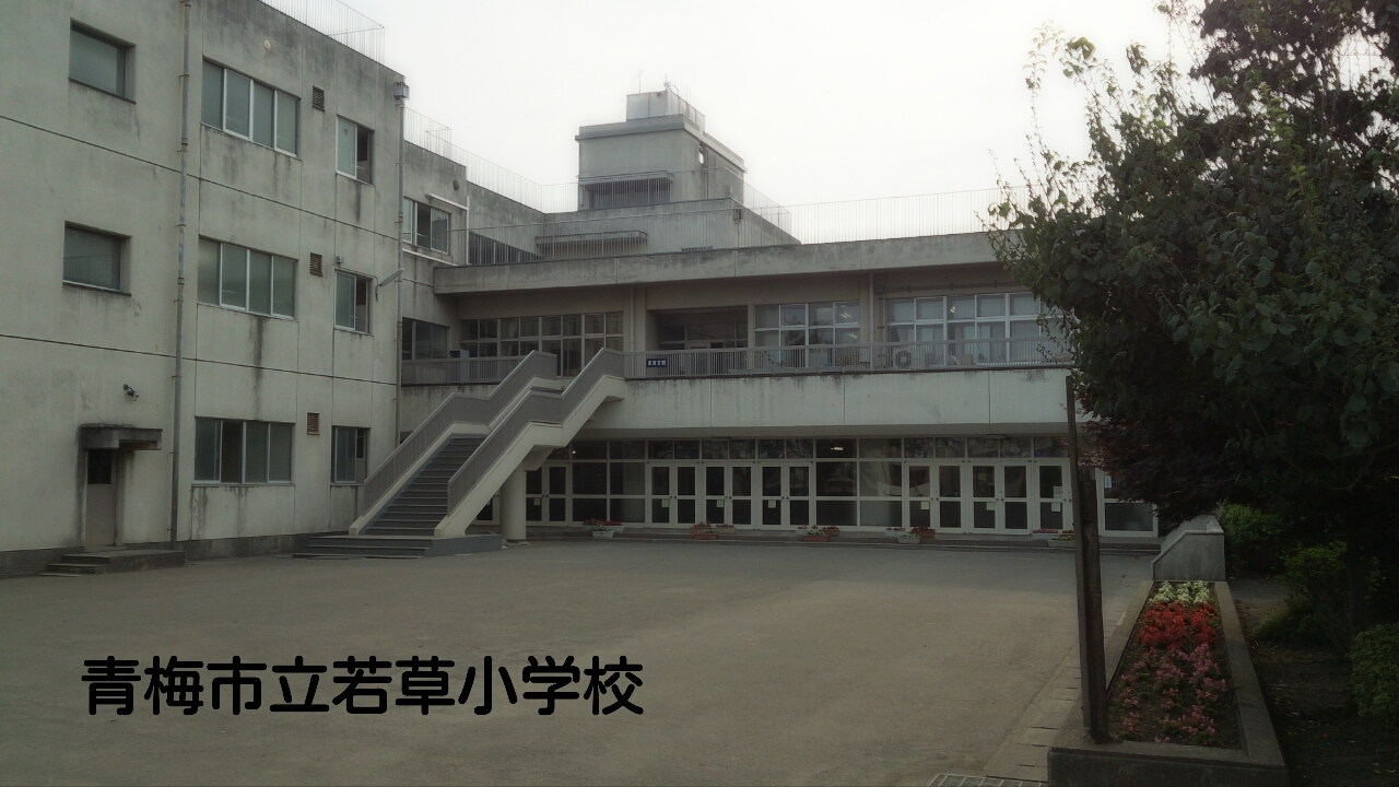 青梅市立若草小学校の児童玄関前（1階）職員玄関前（2階）です。